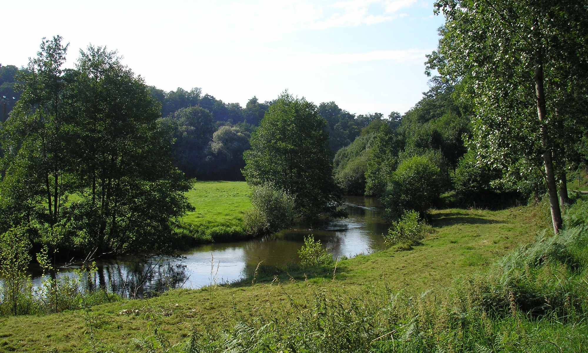 La Vire (Normandie, France), à la limite des communes de Carville et Sainte-Marie-Laumont.